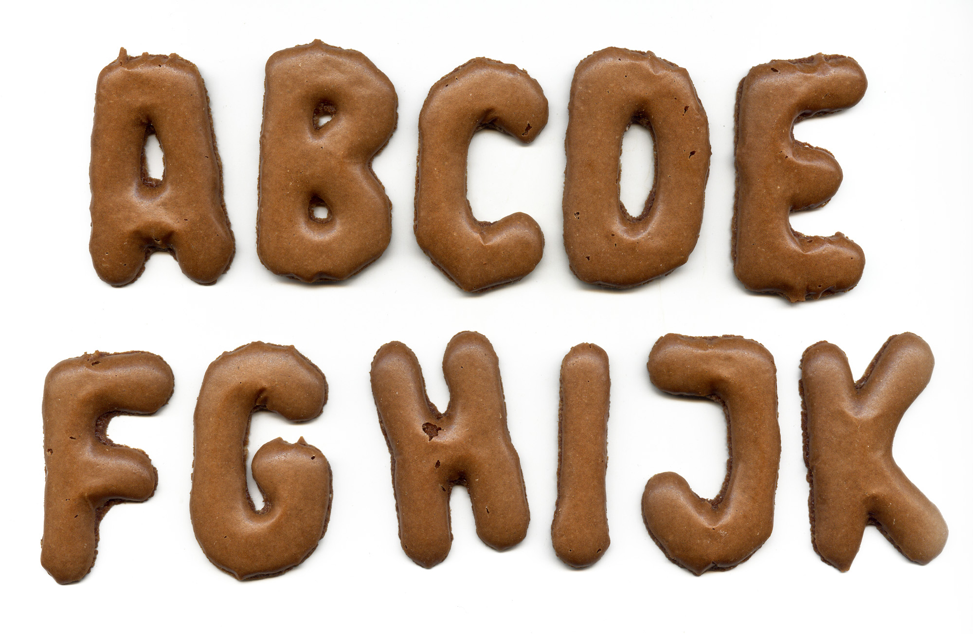 Russisch Brot (industriell hergestellt). Eigene Aufnahme.